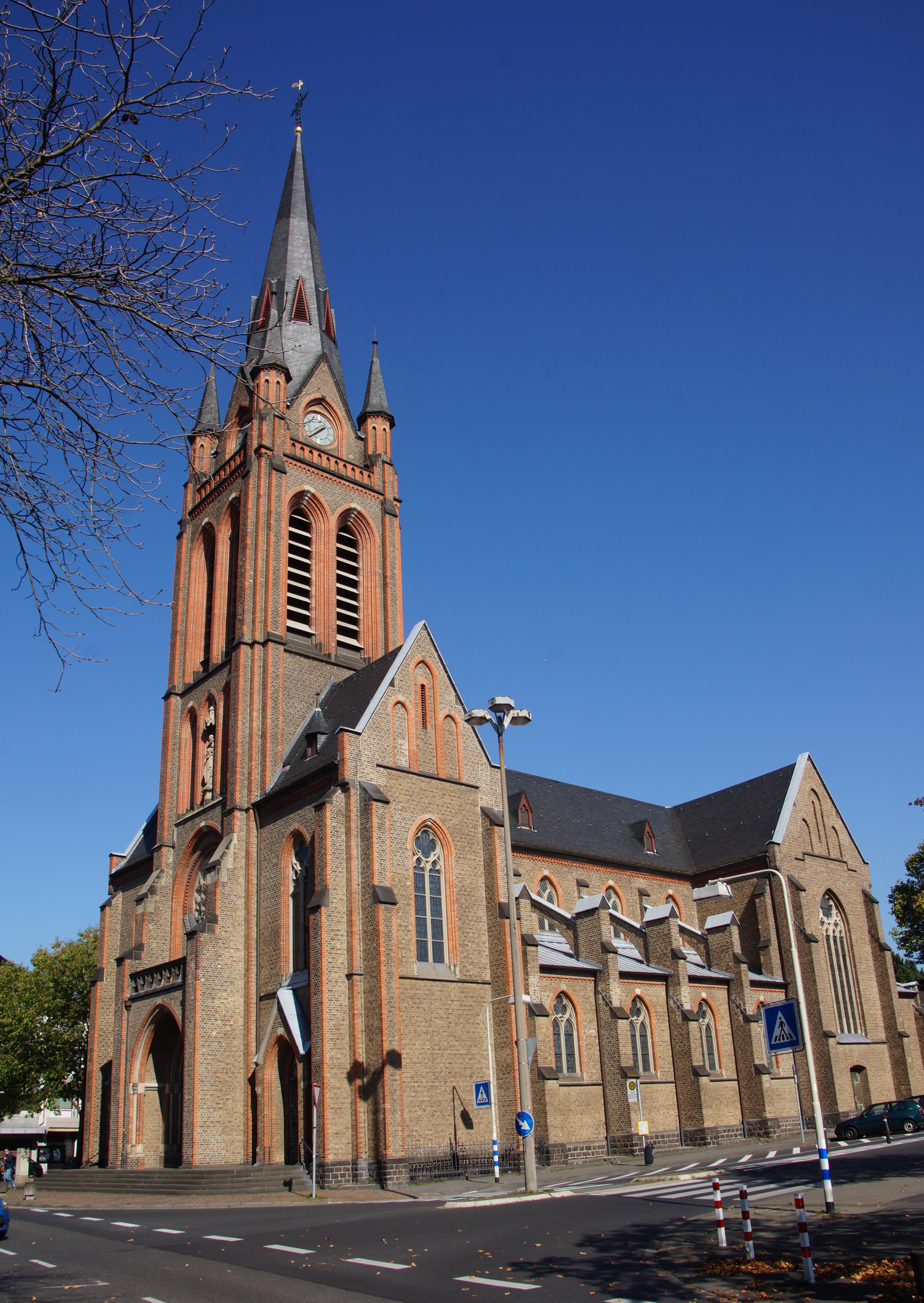 Pfarrkirche St. Josef in Beuel-Mitte